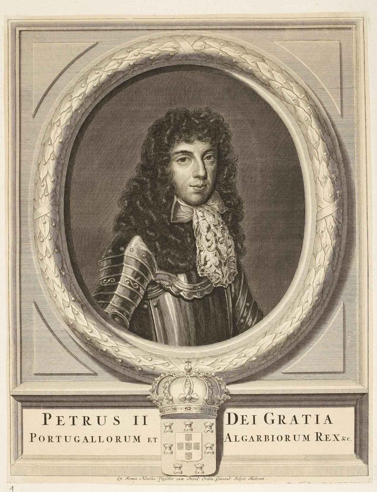 Grafik aus dem Klebeband Nr. 1 der Fürstlich Waldeckschen Hofbibliothek Arolsen Motiv: König Peter II. von Portugal